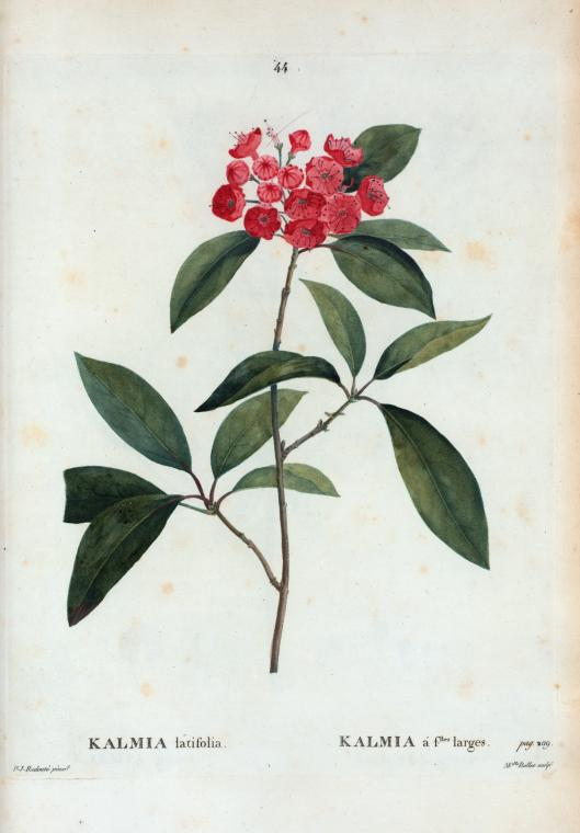 Kalmia latifolia = Kalmia à feuilles larges.